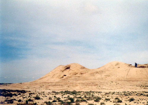 Комплекс городищ (развалины укреплений Джеты-Асар, 4 век после Р.Х.), 80 км к югу от Байконура